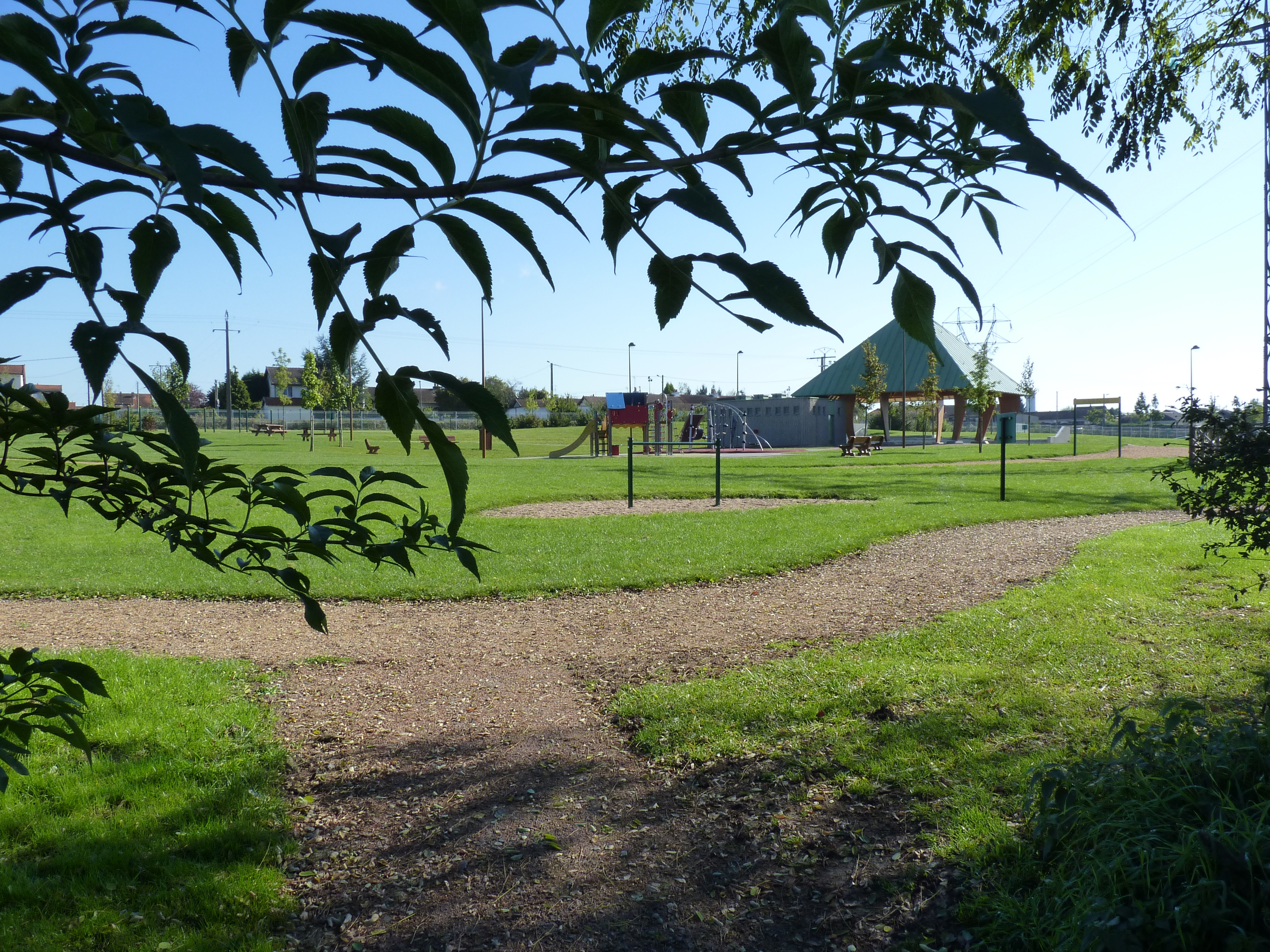 Espace de loisirs comportant un parcours sportif, une aire pour camping-car, un city-stade, des tables de pique-nique